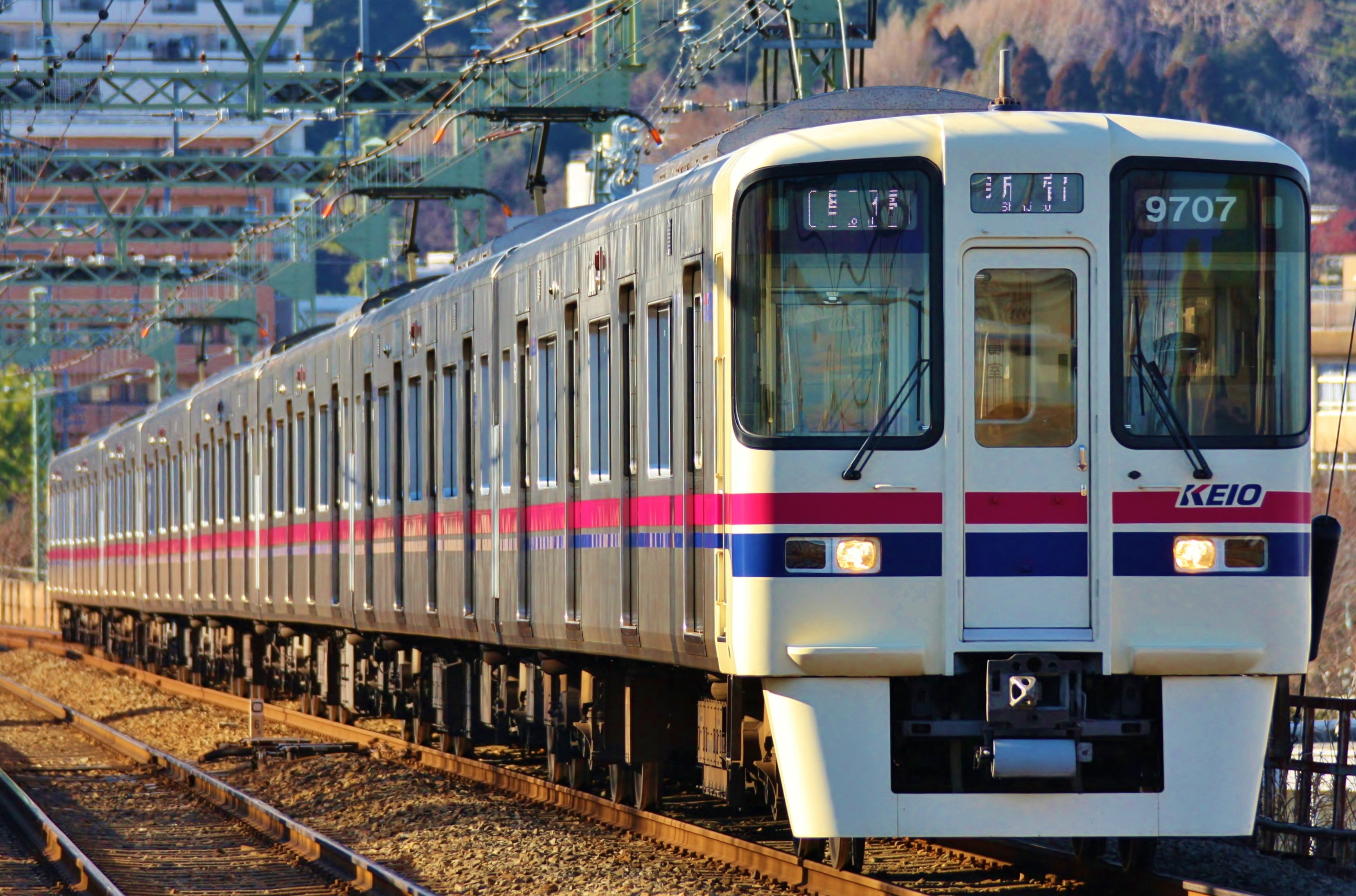 京王電鉄9000系0番台【各停】新宿行。 京王高尾線狭間駅の１番線ホーム高尾山口寄り先端で撮影。 京王高尾線の各駅停車は日中は平日・土休日ともに８両が普通。